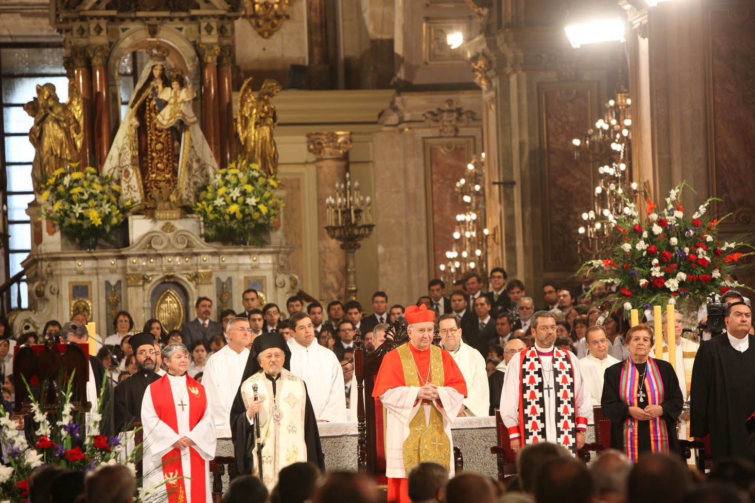 Te Deum Ecuménico realizado en la Catedral Metropolitana de Santiago, durante la celebración de las Fiestas Patrias 2009.